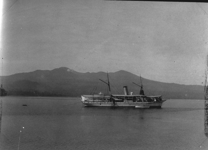 Foto. Foto is genomen tijdens de Wichmann Expeditie naar Noord Nieuw-Guinea. Het expeditieschip de "Zeemeeuw" in de Baai van Menado, met op de achtergrond de vulkanen Lokon en Empung